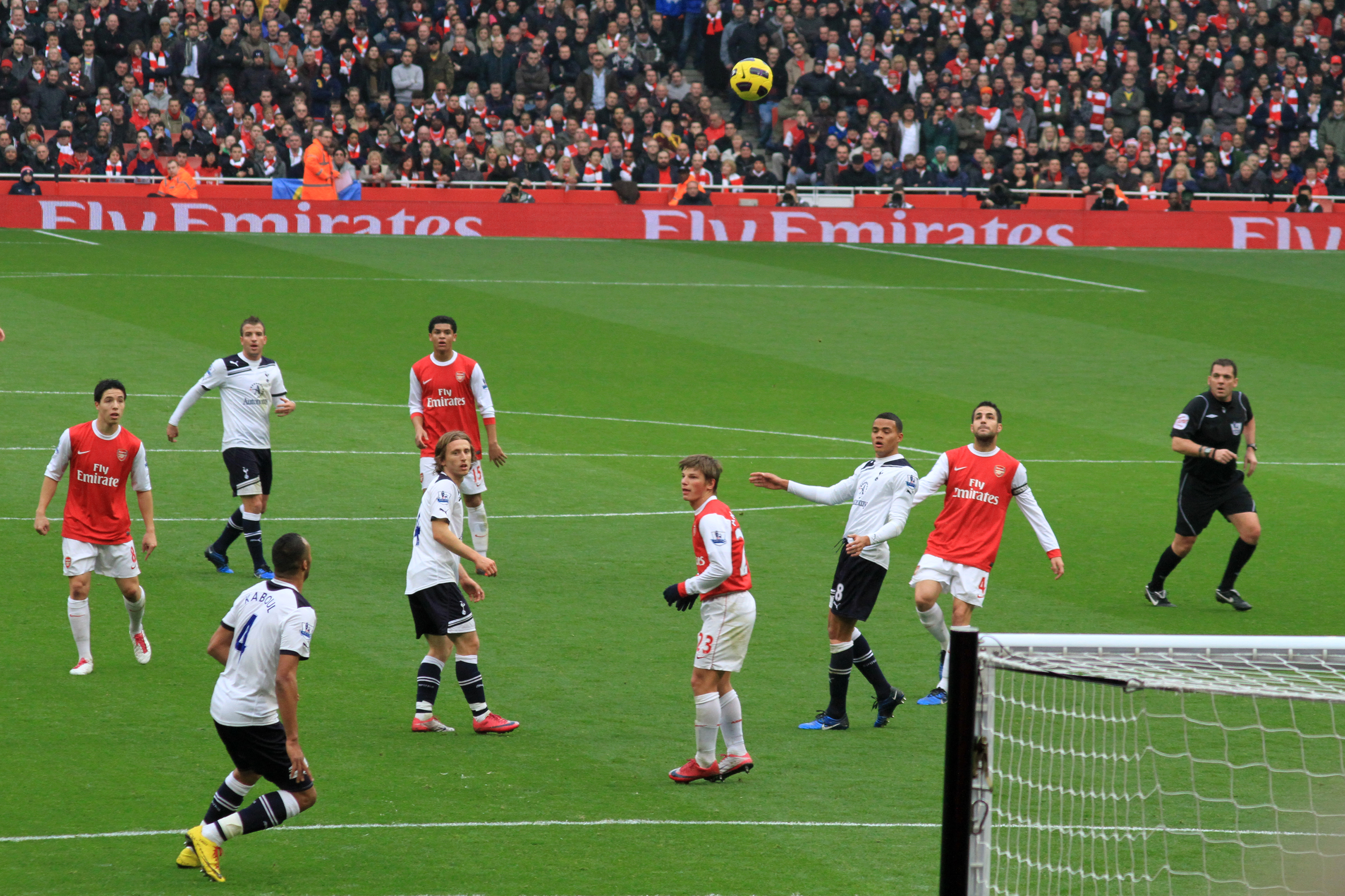 Arsenal attack! 1